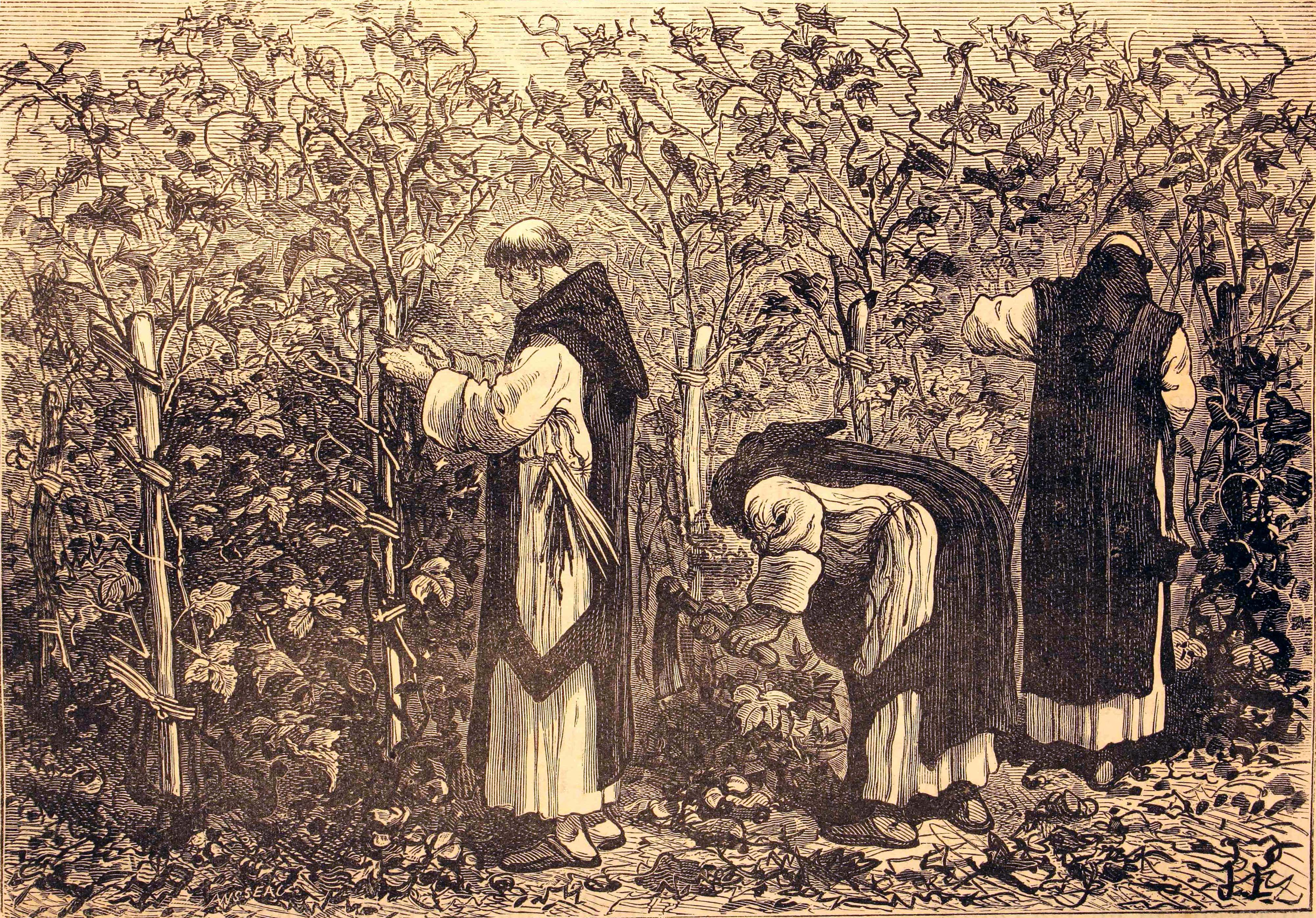 Ilustraciones de la obra : Les merveilles de l'industrie ou, Description des principales industries modernes / par Louis Figuier. - Paris : Furne, Jouvet, [1873-1877]